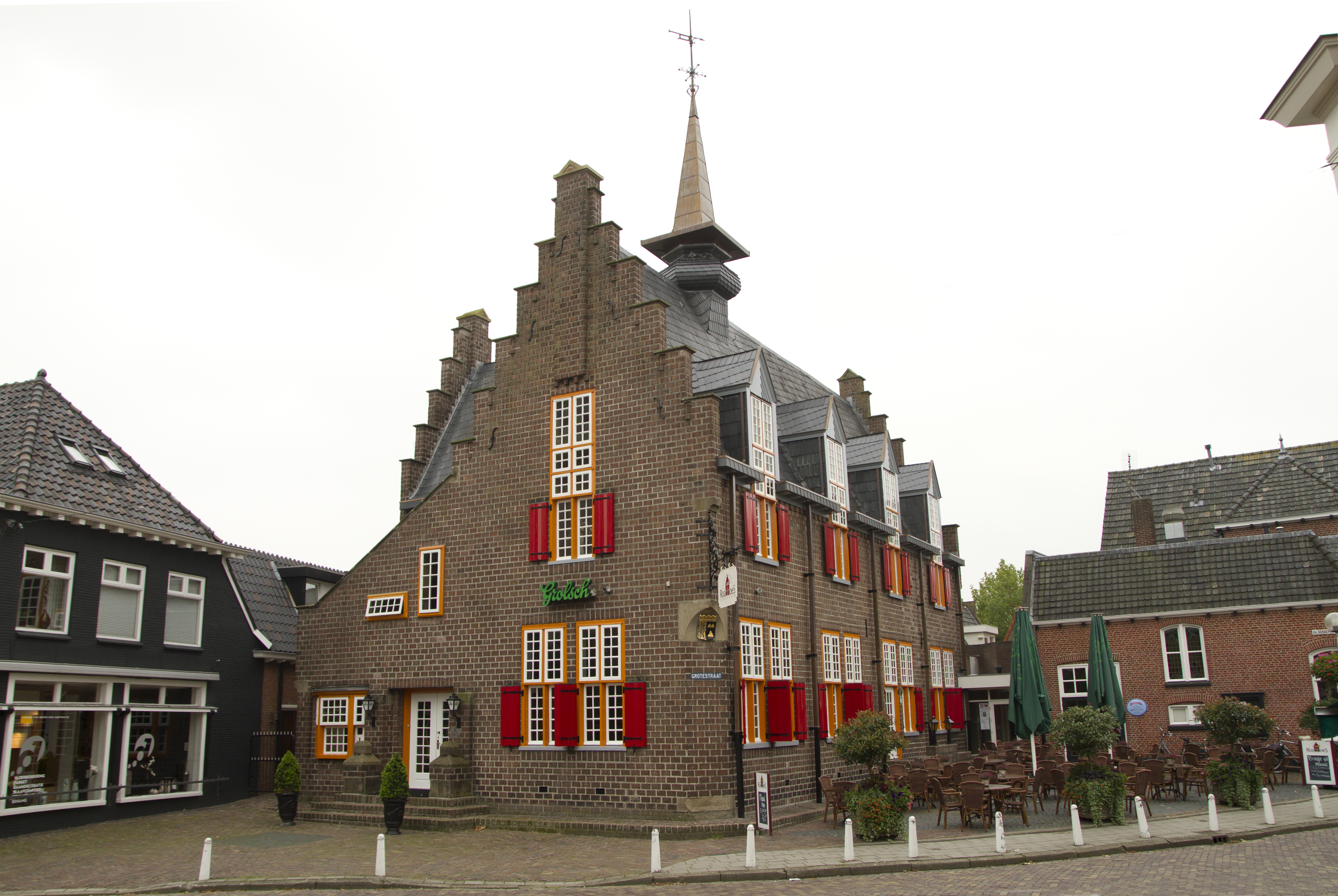 Tubbergen, Grotestraat 60; Voormalig raadhuis door architect H.W. Valk, nu in gebruik alsrestaurant. Eerste steenlegging 8 augustus 1930 door Burgemeester Luykx